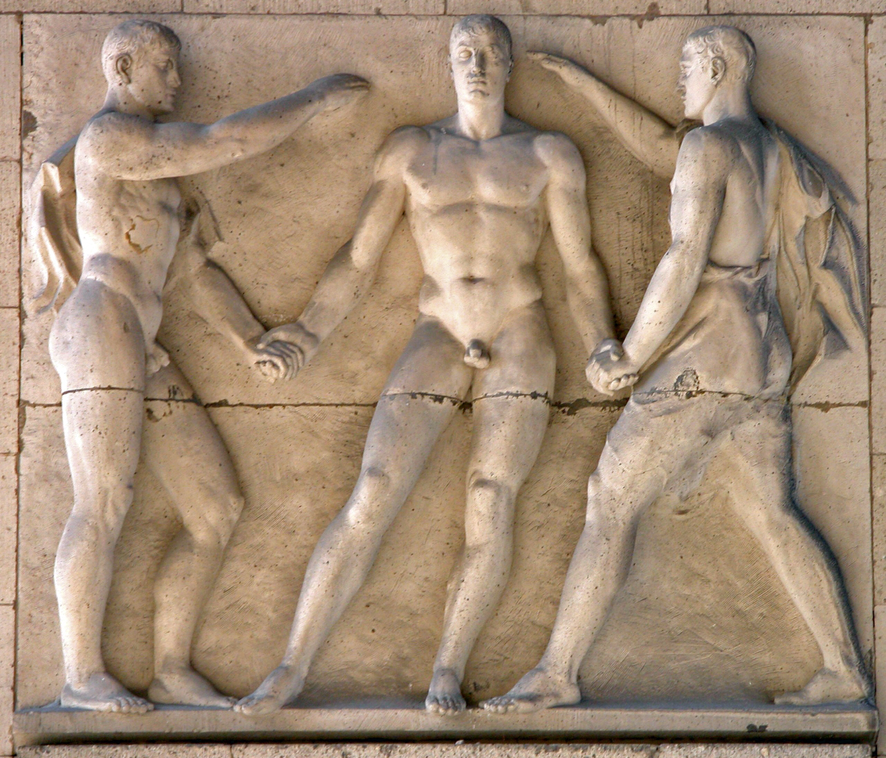 Braunschweig: „Akademie für Jugendführung“, Relief im Eingangsbereich. Brunswick, Germany: “Akademie für Jugendführung”, relief in the entrance area.